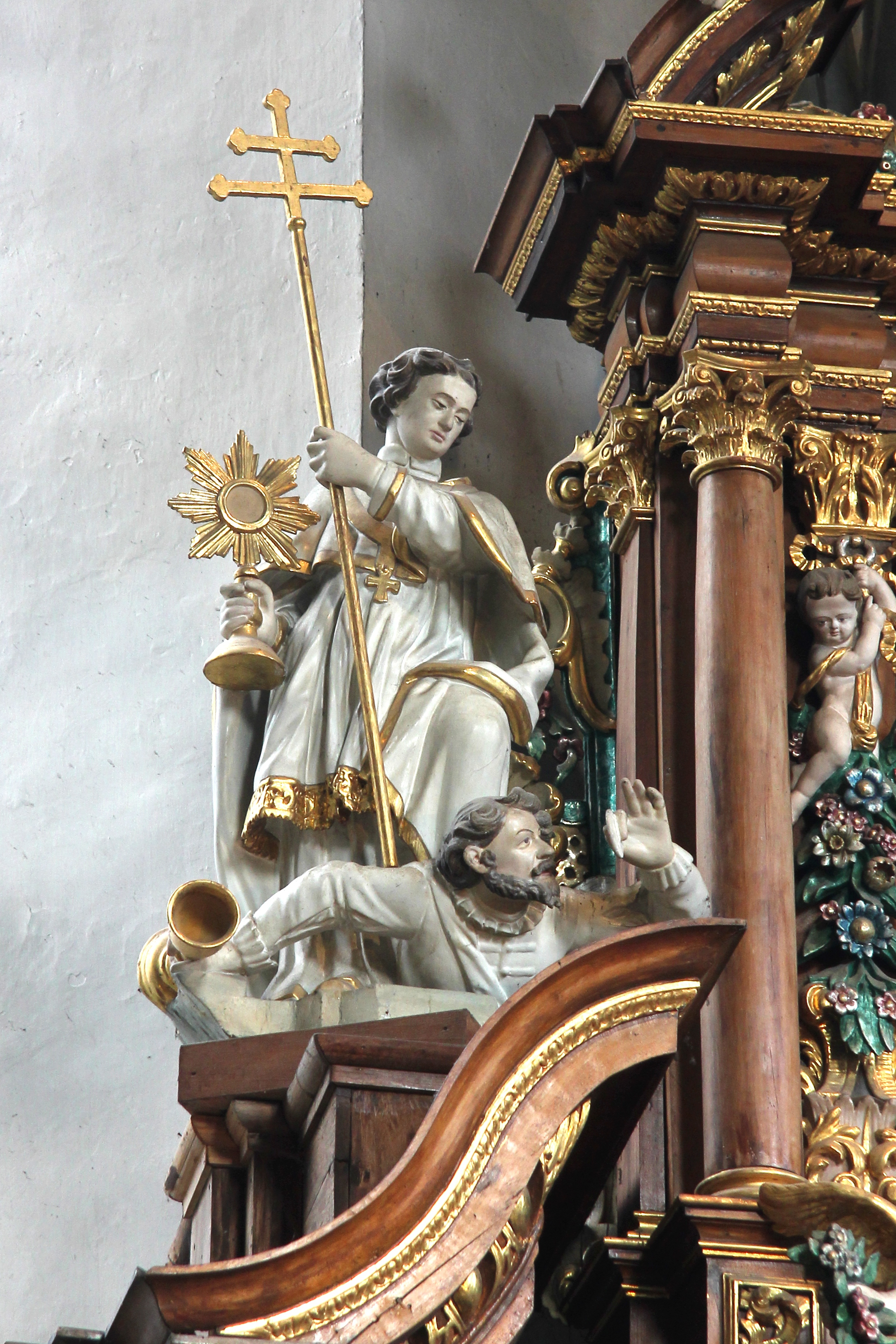 Statue des hl. Norbert, der die Eucharistie gegen den Ketzer Tanchelm verteidigt, Detail des linken Seitenaltars der Pfarrkirche St. Potentinus in Wehr (Eifel), frühes 18. Jahrhundert